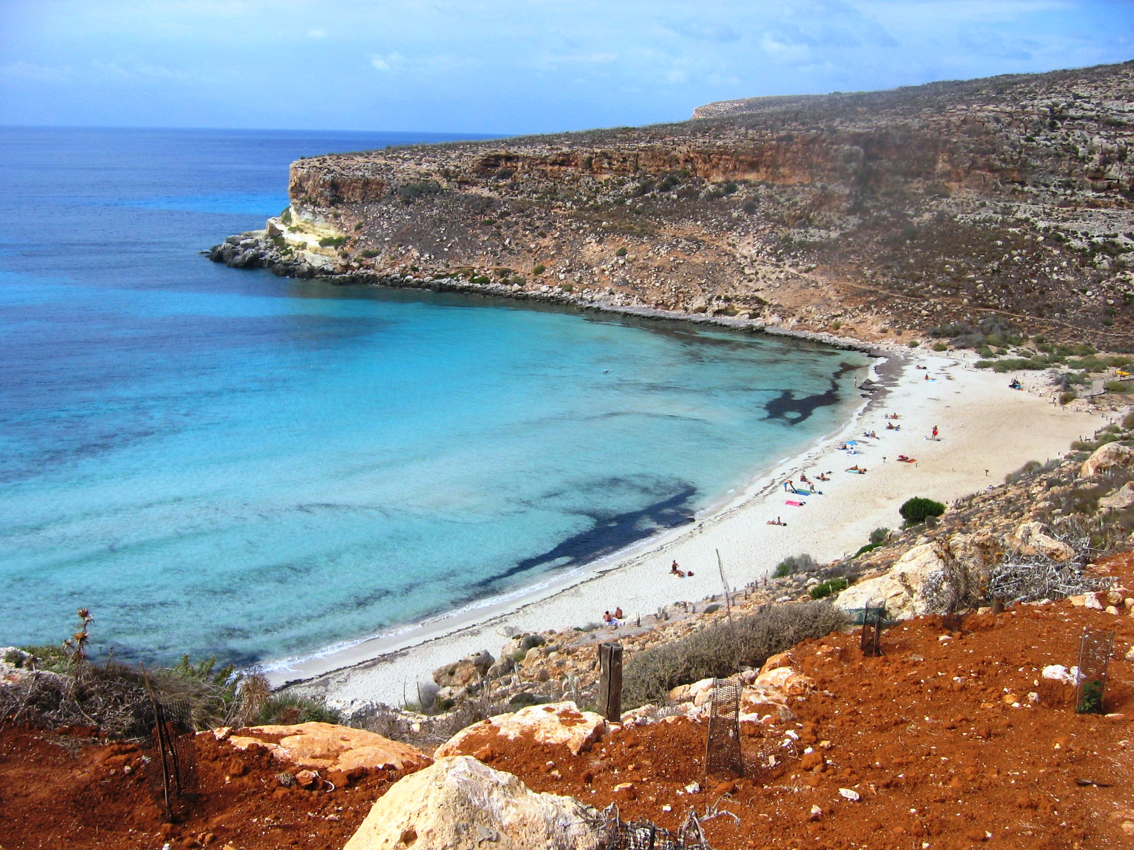 strand bij Coniglie eiland-Lampedusa